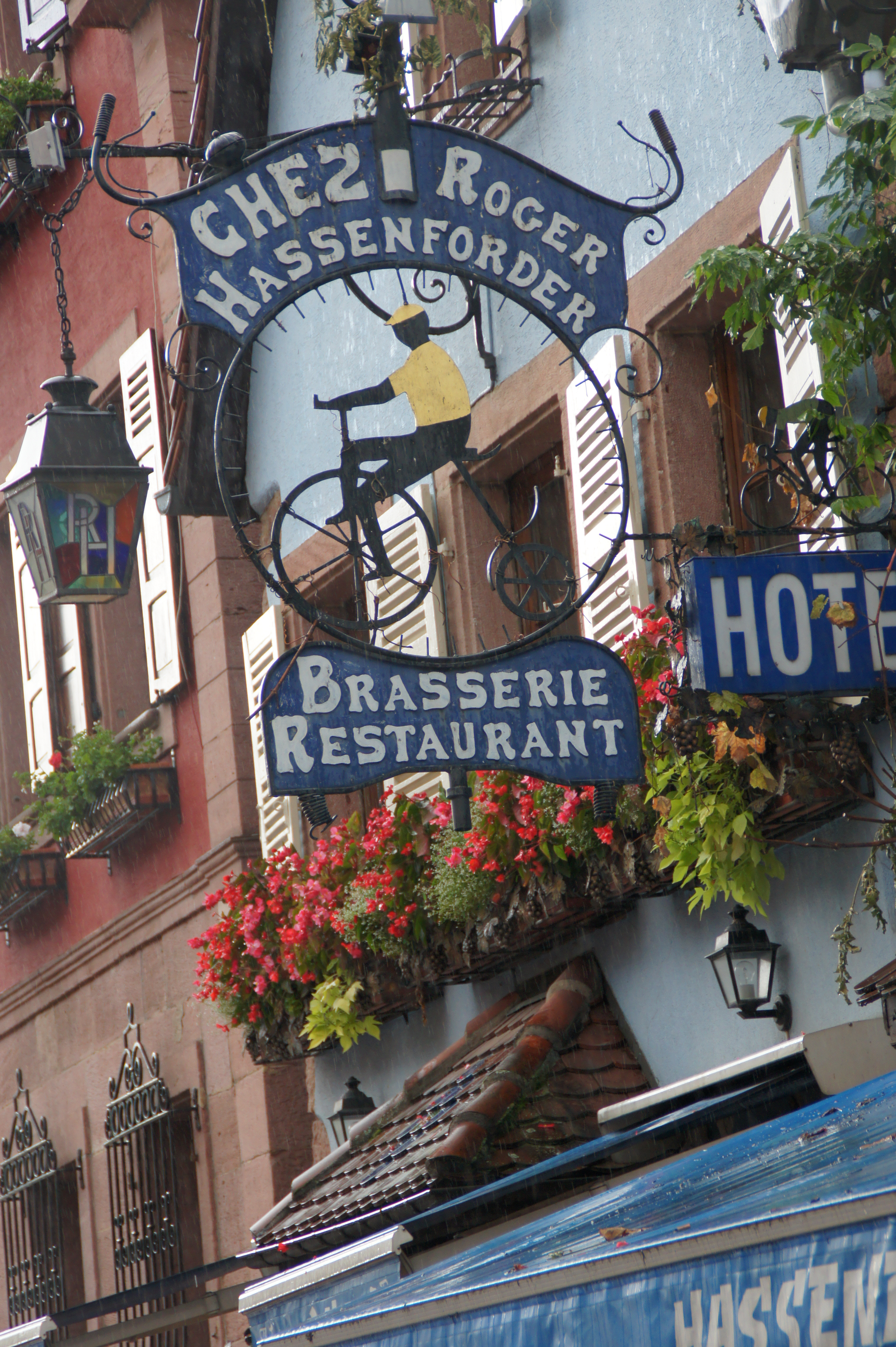 Enseigne de l'hotel restaurant Hassenforder à kaysersberg